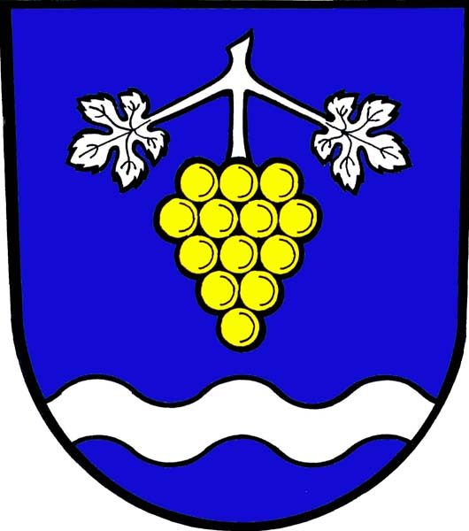 Znak obce Malá Štáhle